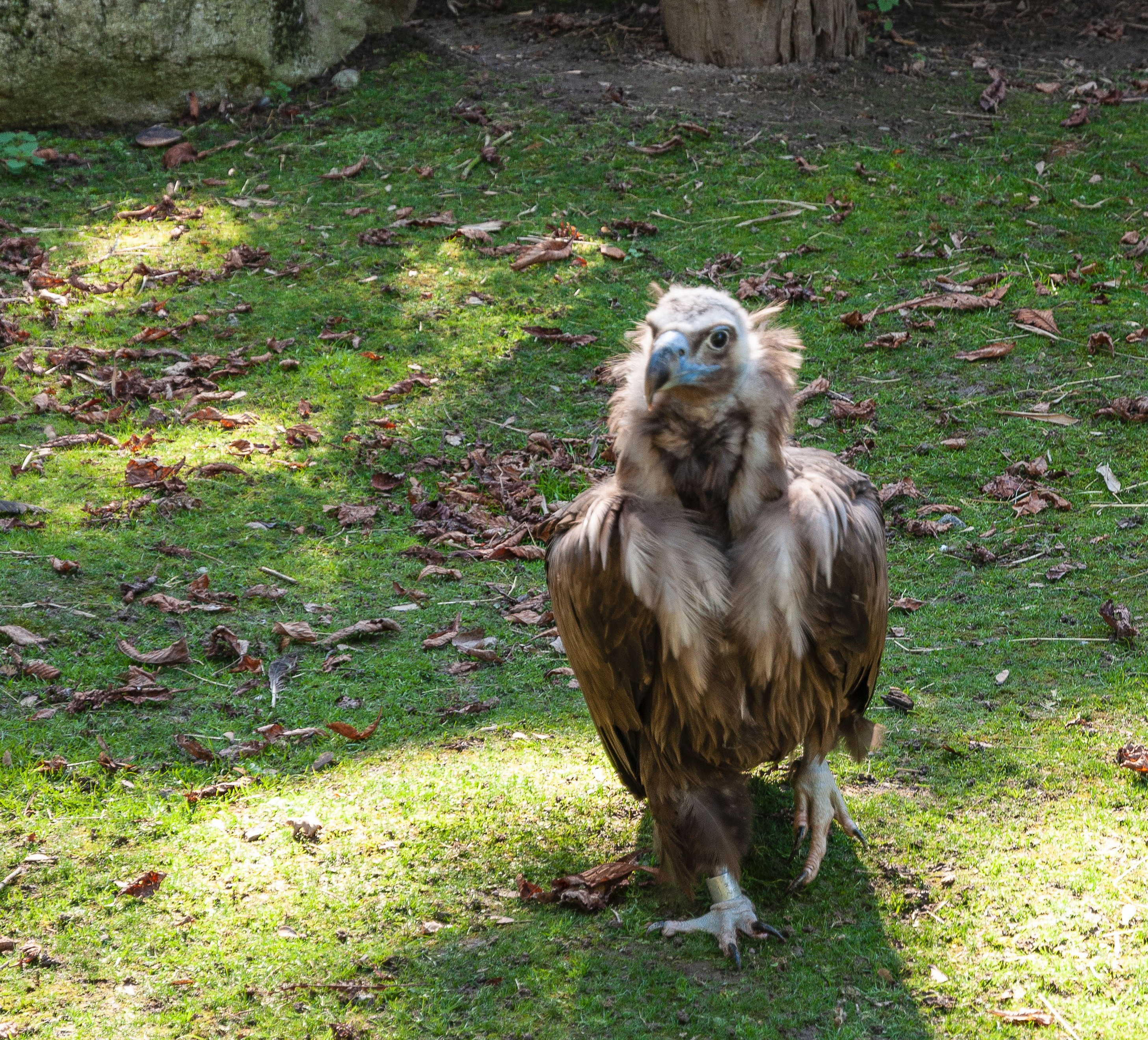 Vautour moine du Parc zoologique et botanique de Mulhouse.